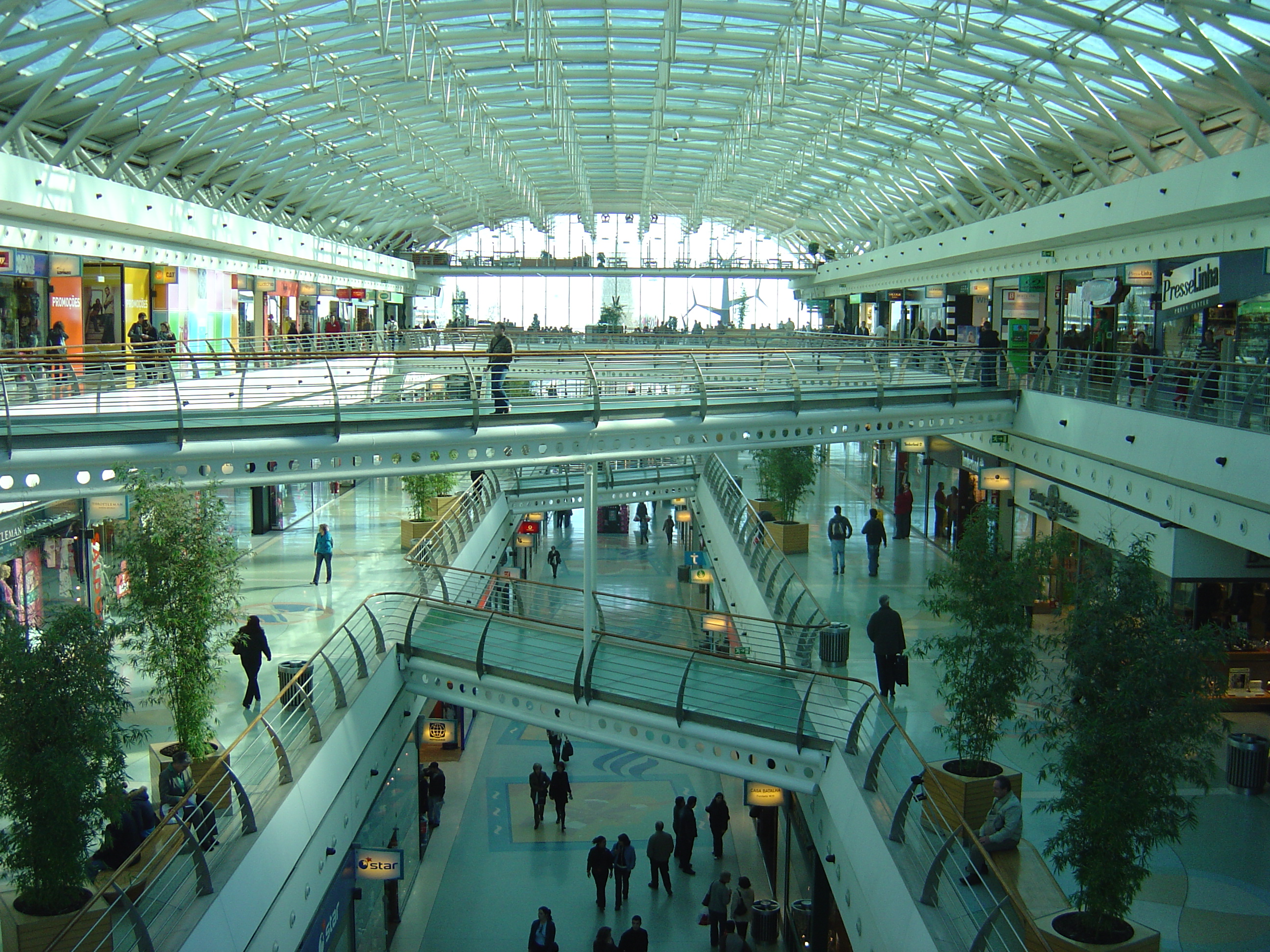 Lisbon, Portugal